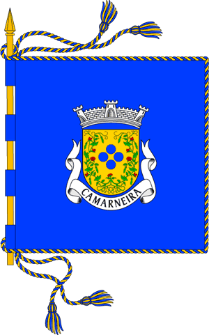 Bandeira da Junta de Freguesia da Camarneira